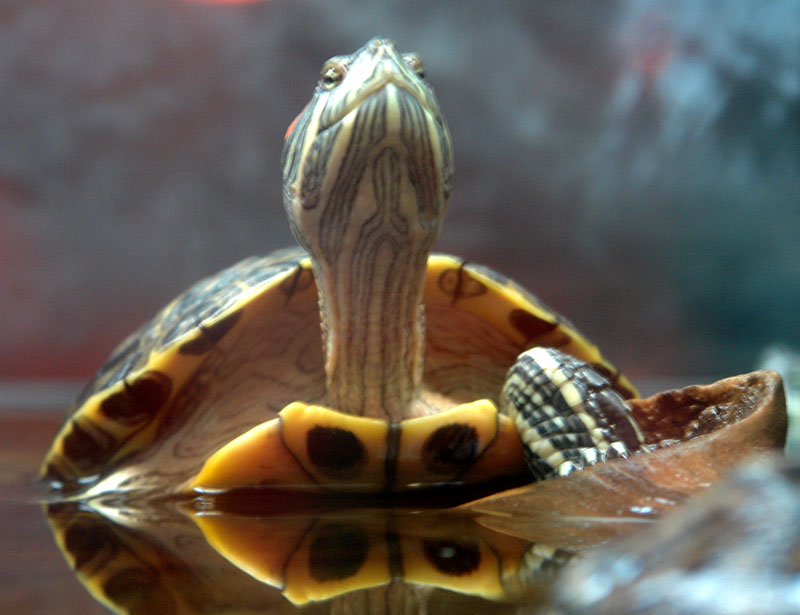 კუმ ფეხი გამოყო :)